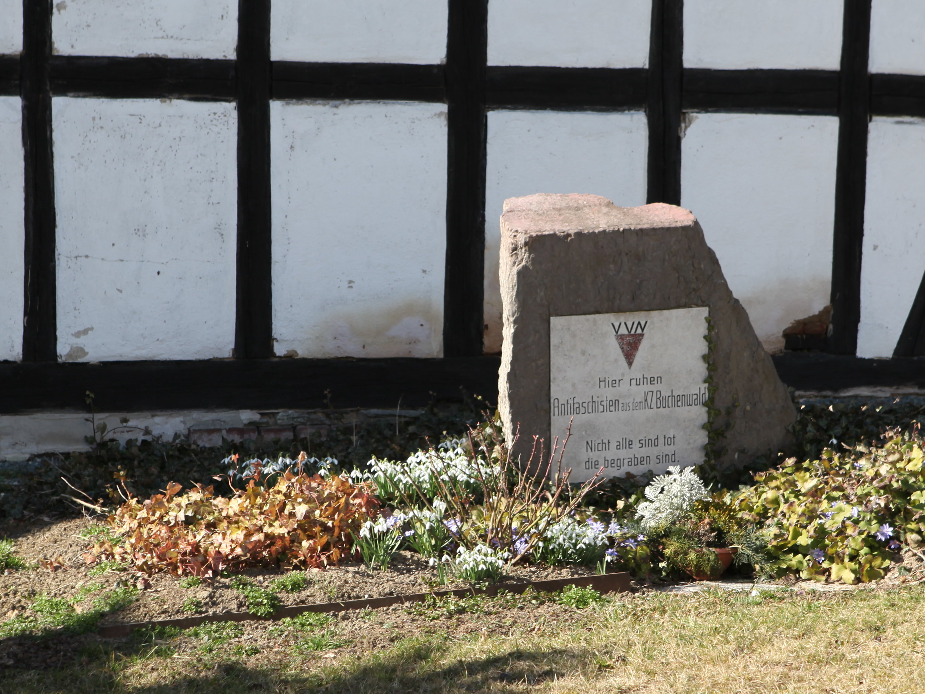 Gedenkstein auf dem Friedhof in Langgrün, Ot Gefell